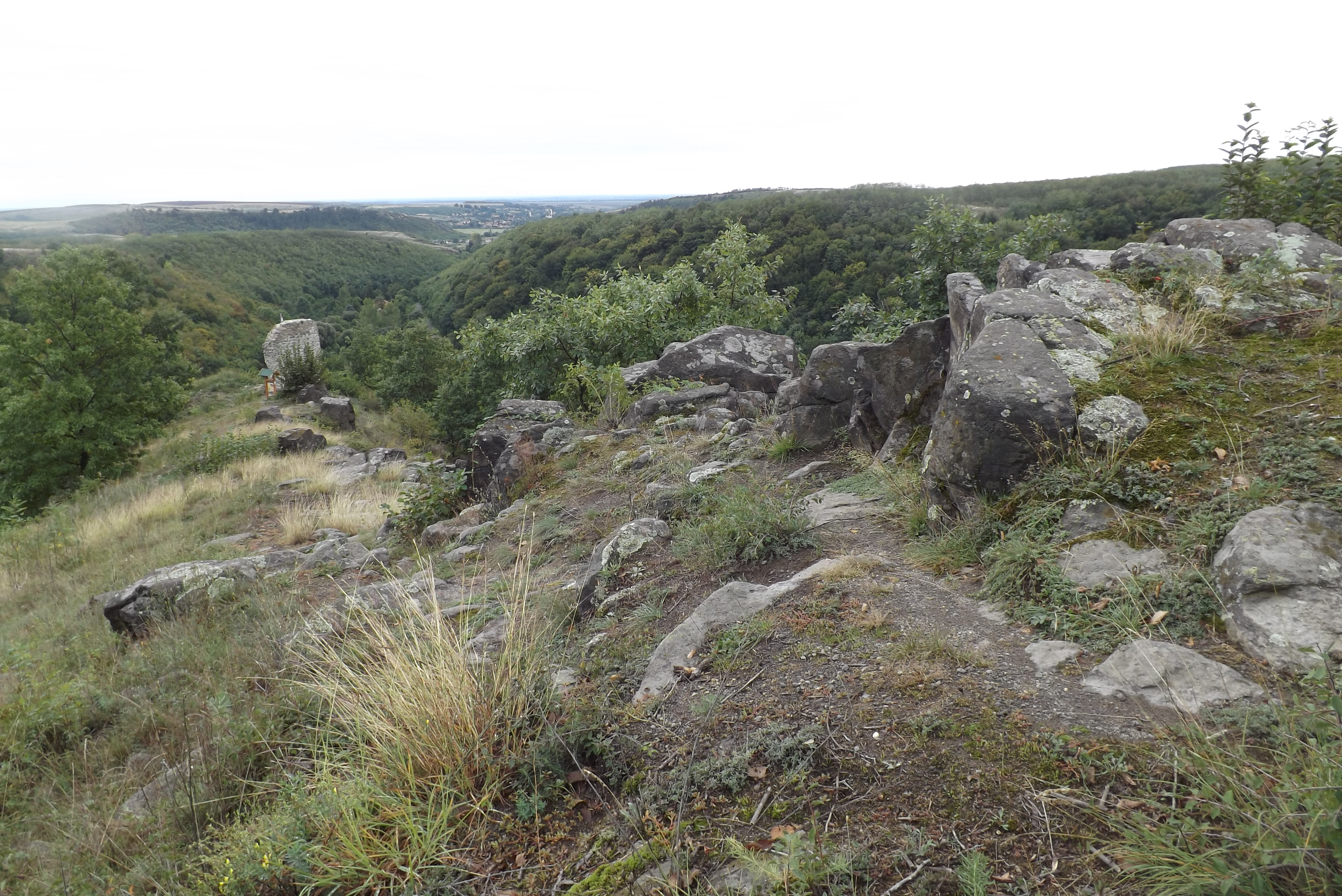 Latortető, Őrsúr várától nézve. Előtérben Latorvár romjaival (Sály)